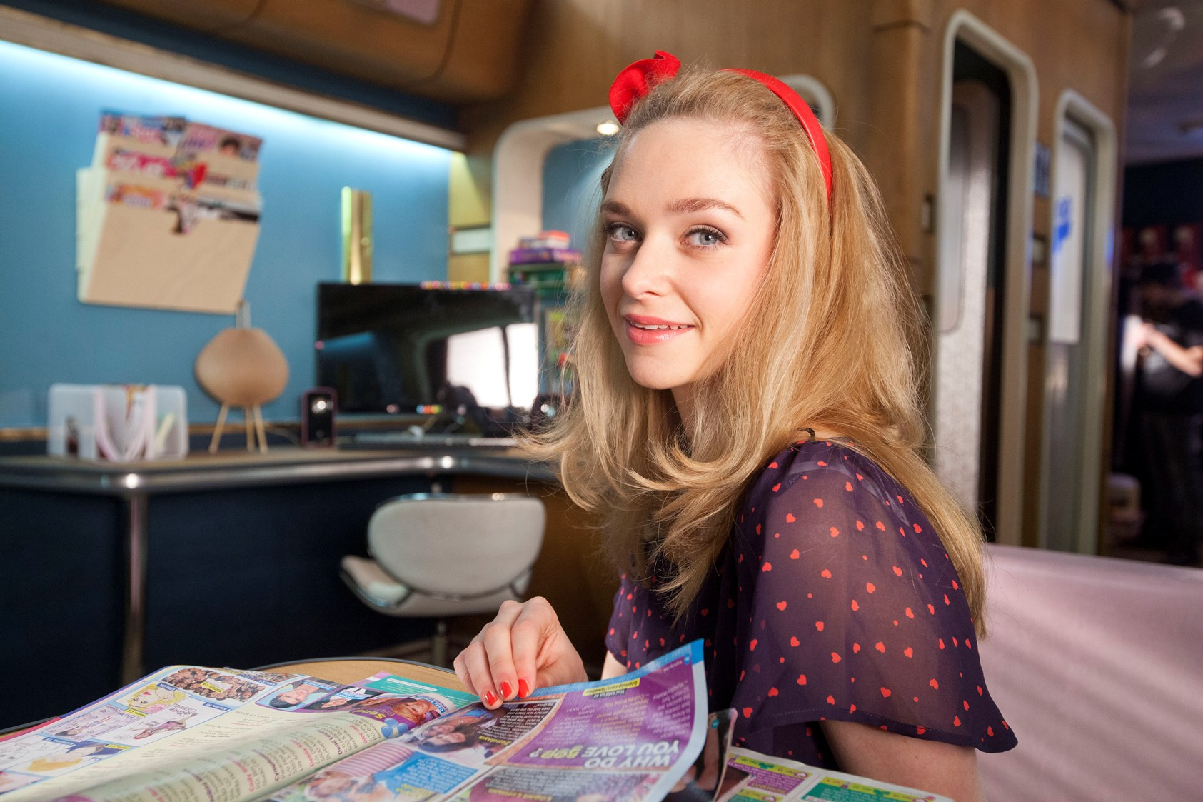 Nederlands actrice